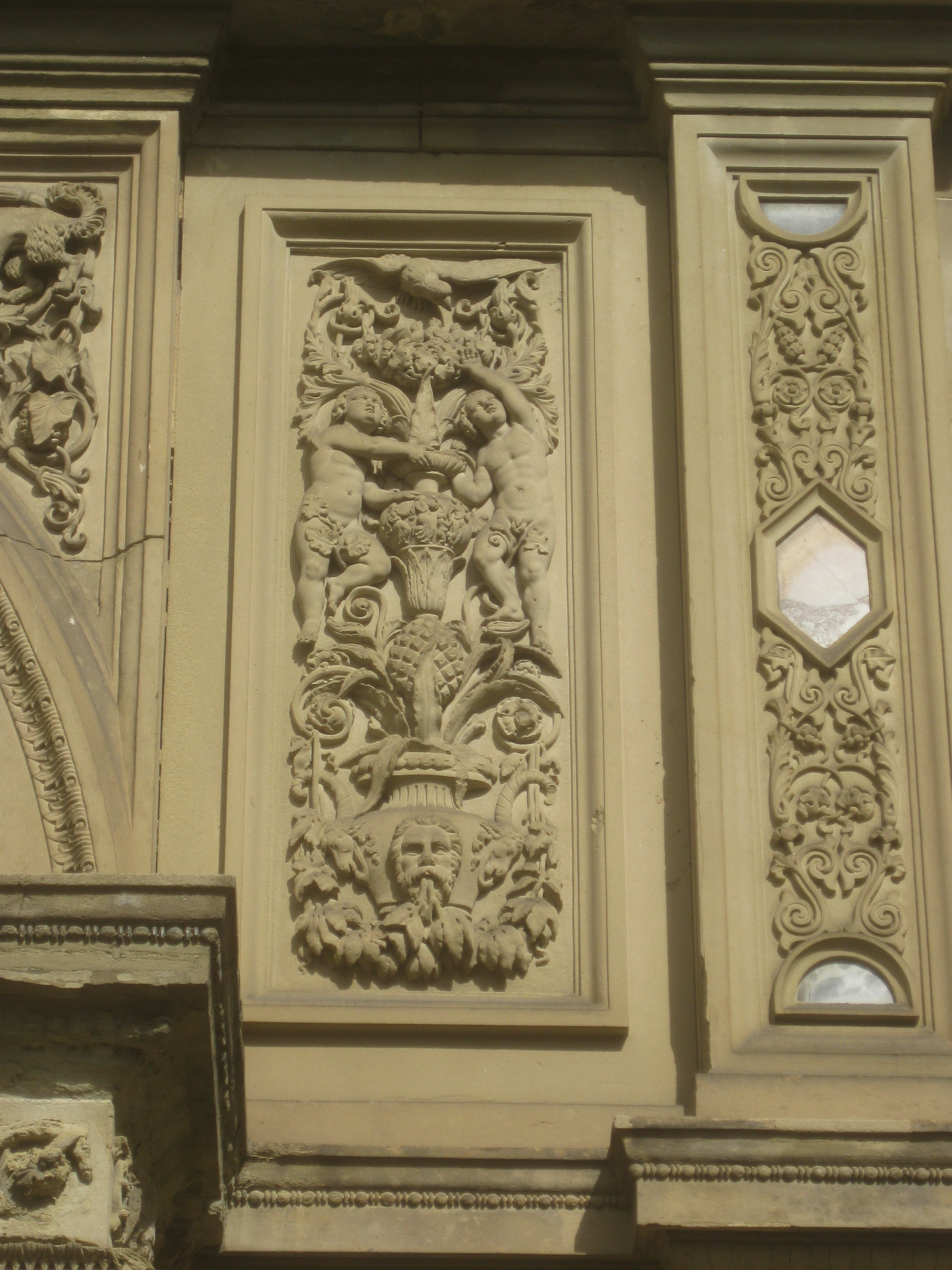 Stuttgart, Villa Berg, Südfassade, Füllung Füllung 4 (Zählung von links nach rechts).